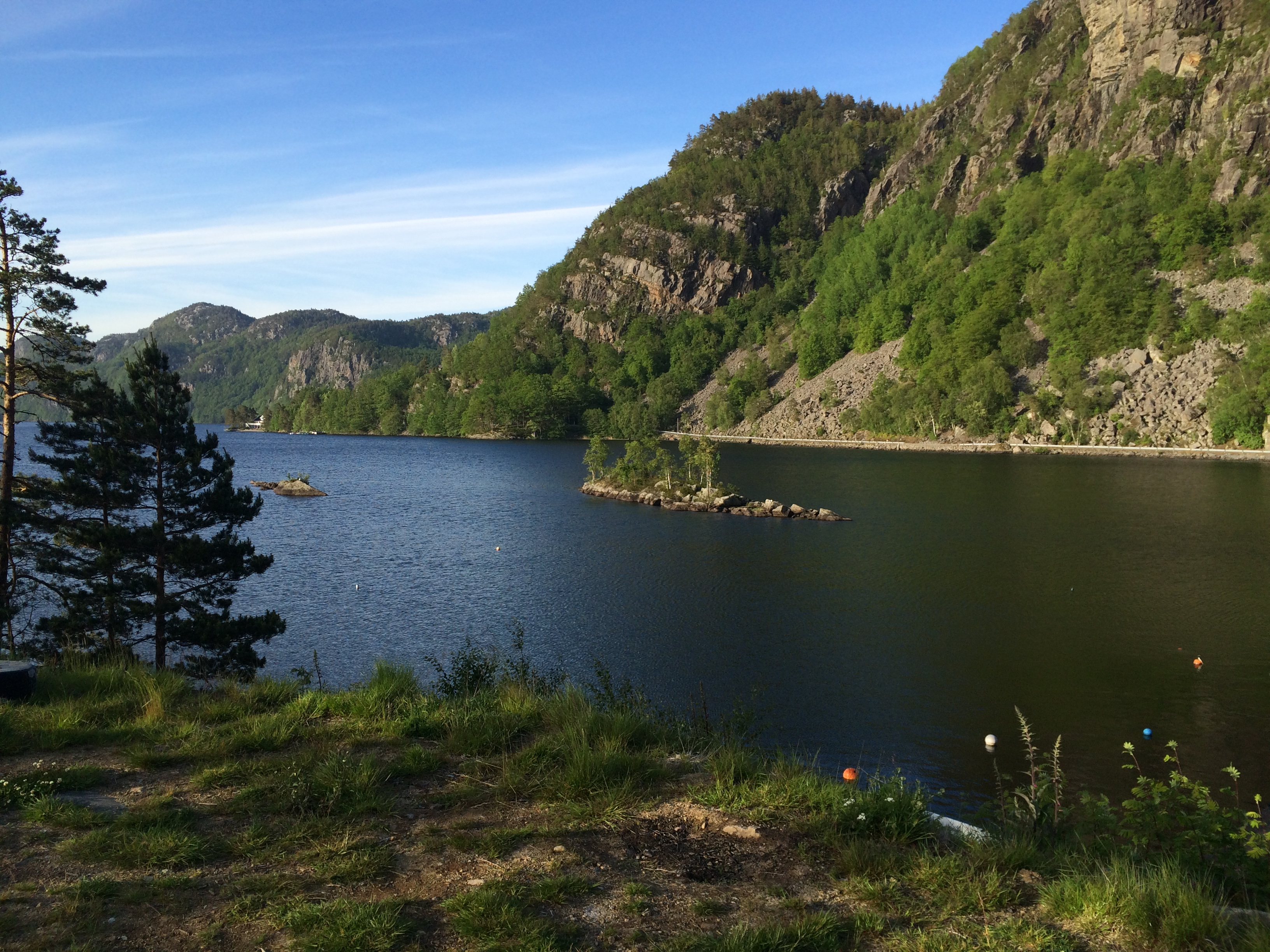 Selura Lake